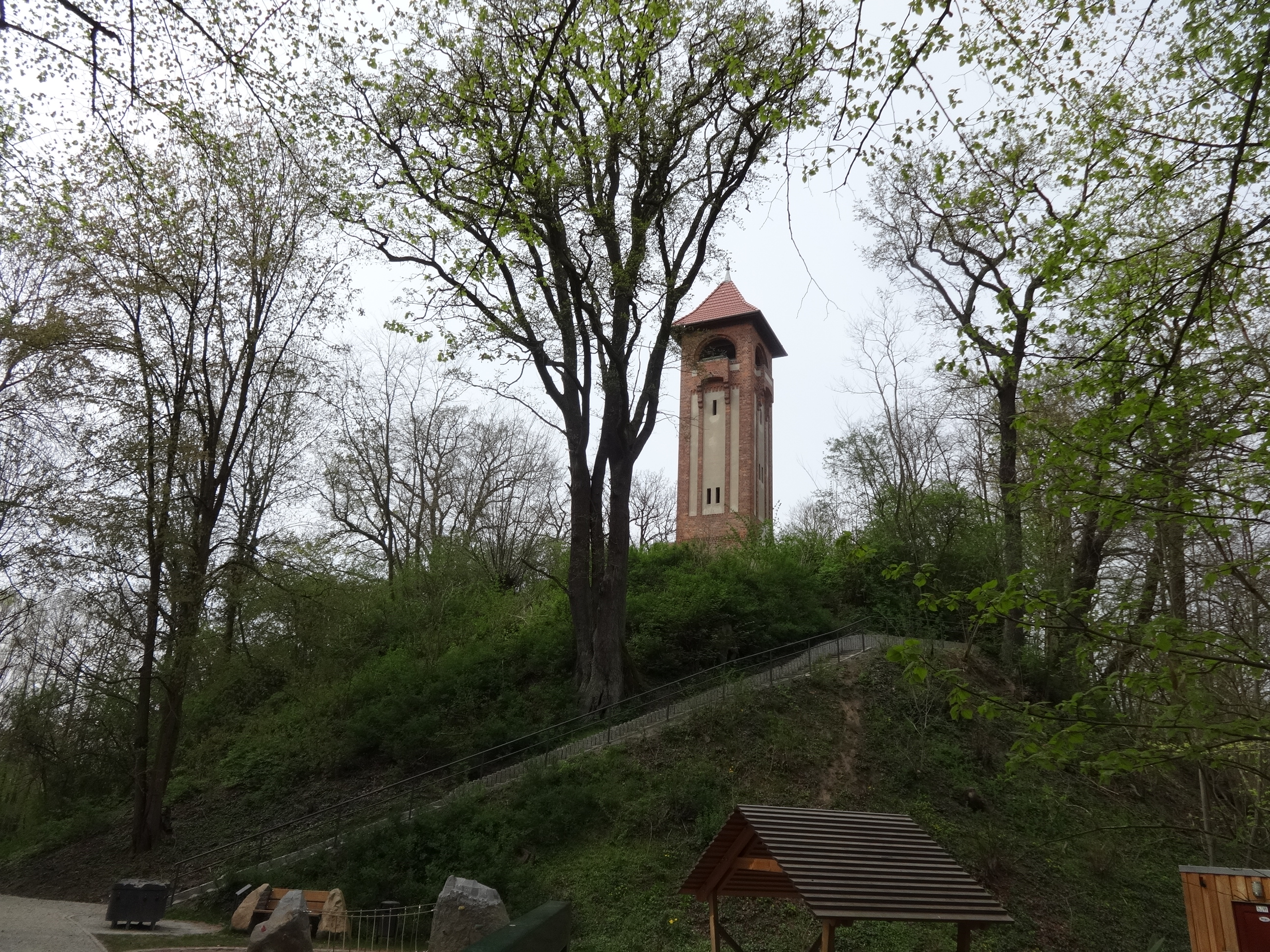 Der Turm wurde 1907 zu Ehren Kaiser Friedrich III. errichtet und im 21. Jahrhundert unter der Federführung eines Heimatvereins saniert. Von einer Aussichtsplattform aus erstreckt sich der Blick über das Biesenthaler Becken bis nach Berlin.